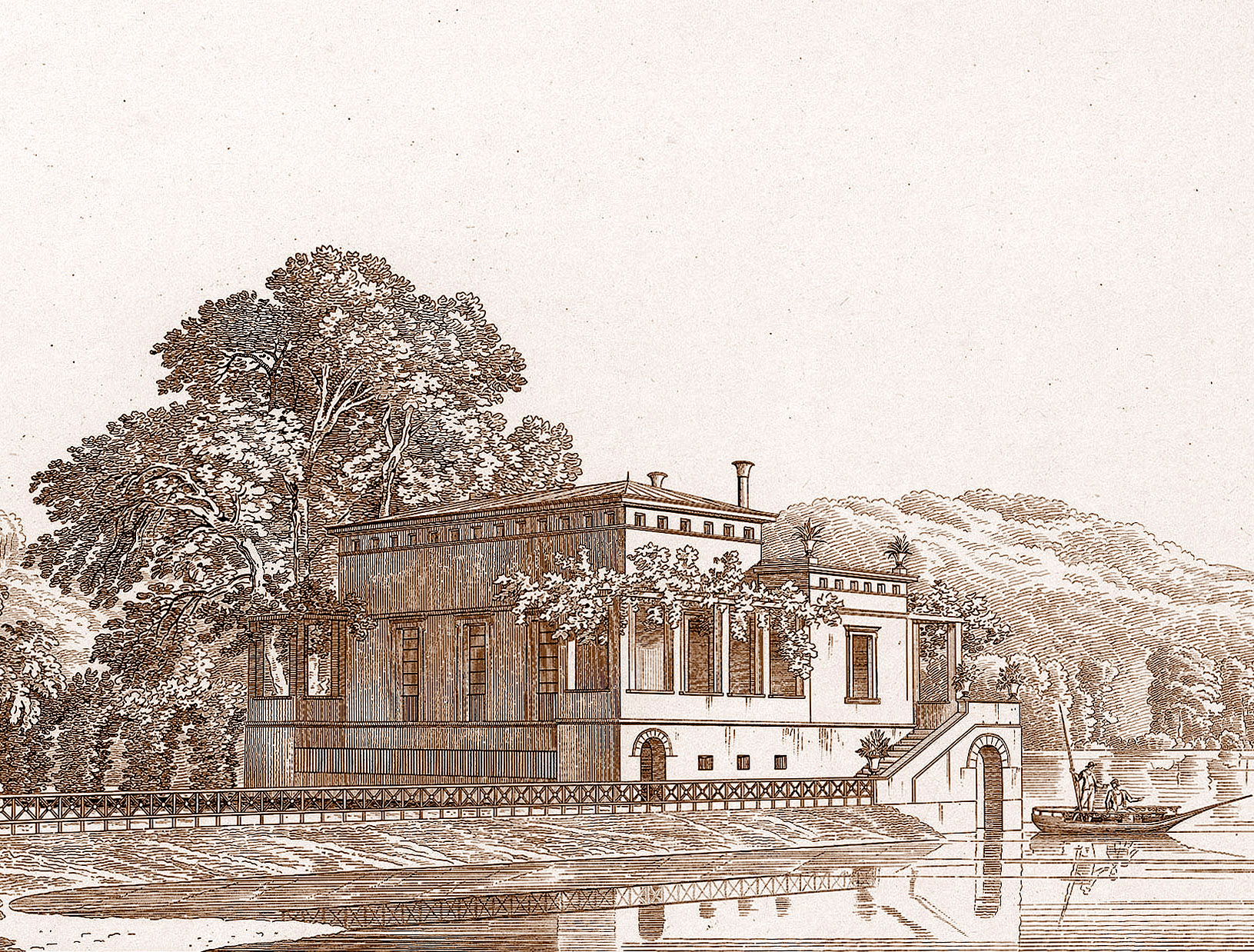 Entwurf zum Prinzen-Lusthaus an der Havel